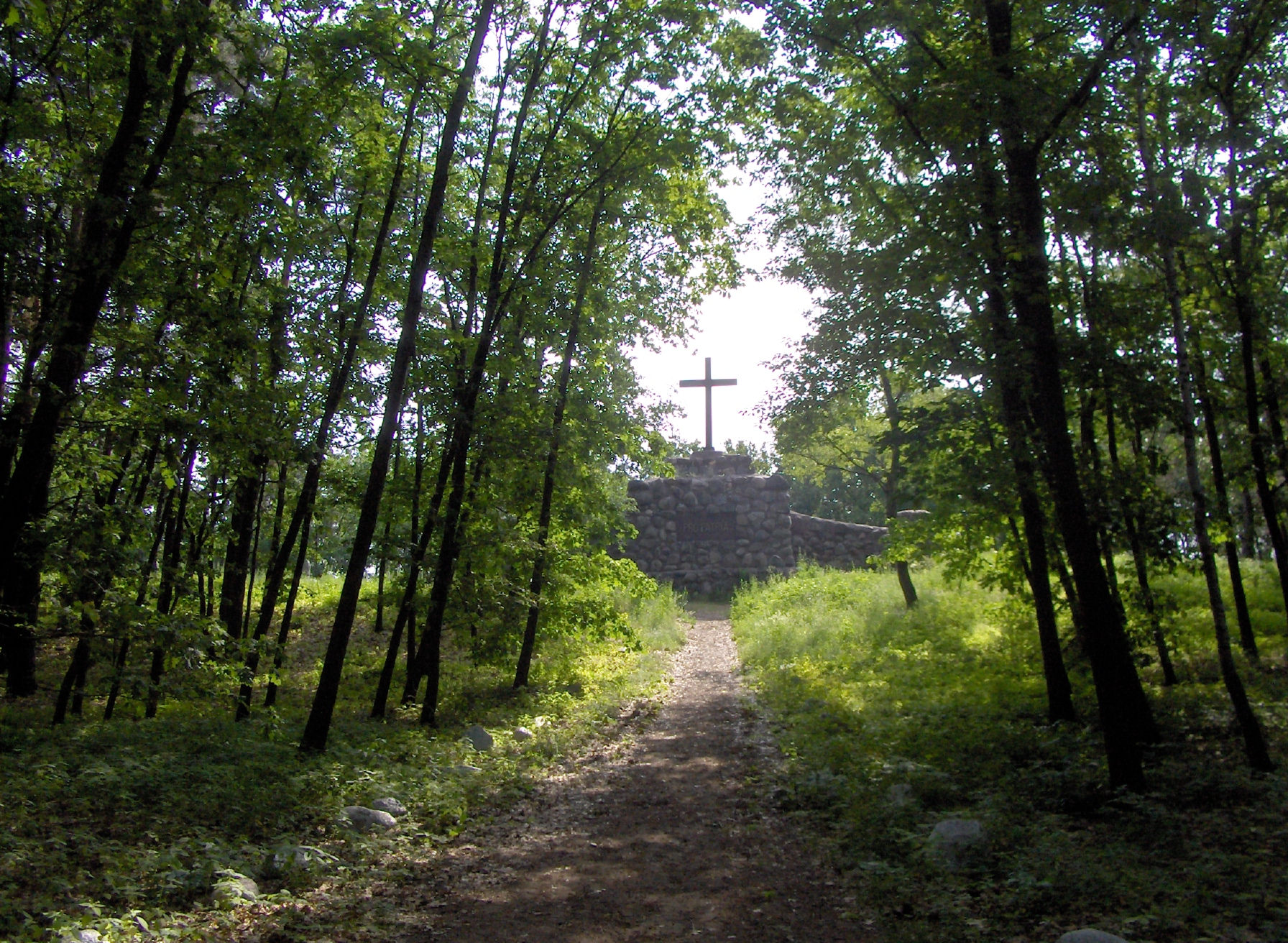 Starowa Góra, Poland